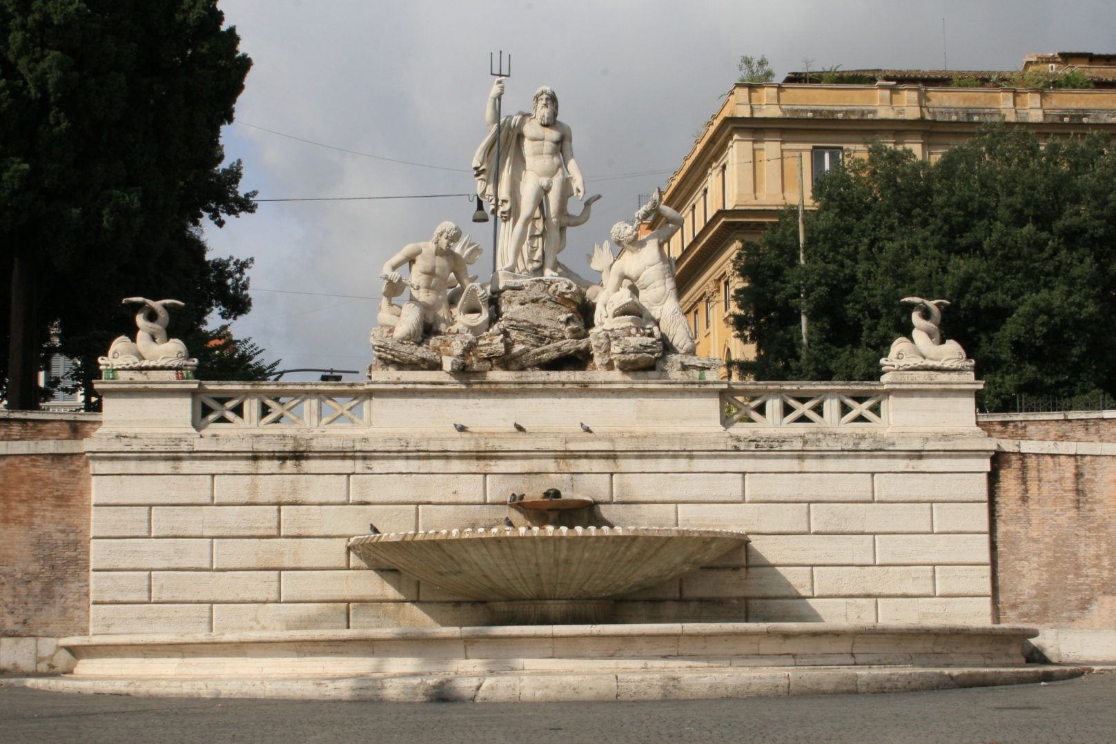 Fontana del Nettuno or Neptune's Fountain, in the Piazza del Popolo, Rome.